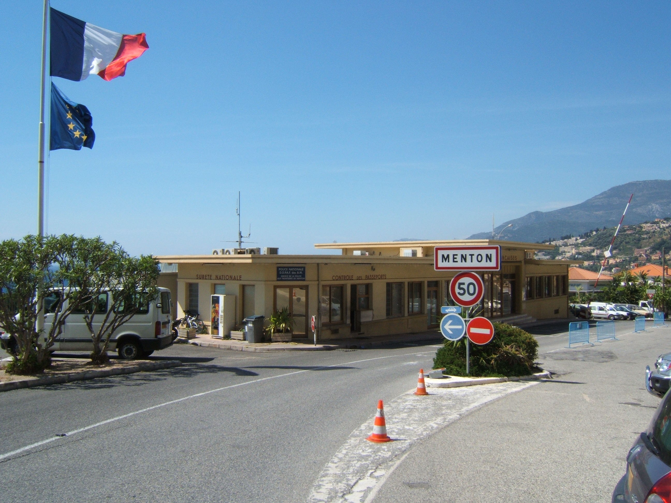 Le fameux poste de douane de Menton rendu célèbre par le film de Gérard Oury "Le Corniaud". Dans ce "road movie" comique, Antoine Maréchal y croise Léopold Saroyan et ses sbires lors du désossement de la Cadillac par les douaniers.